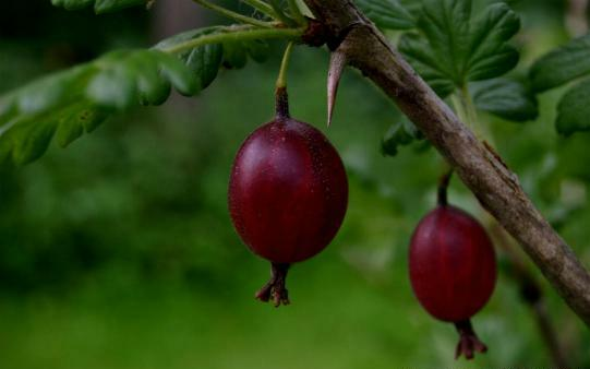 Ribes uva-crispa